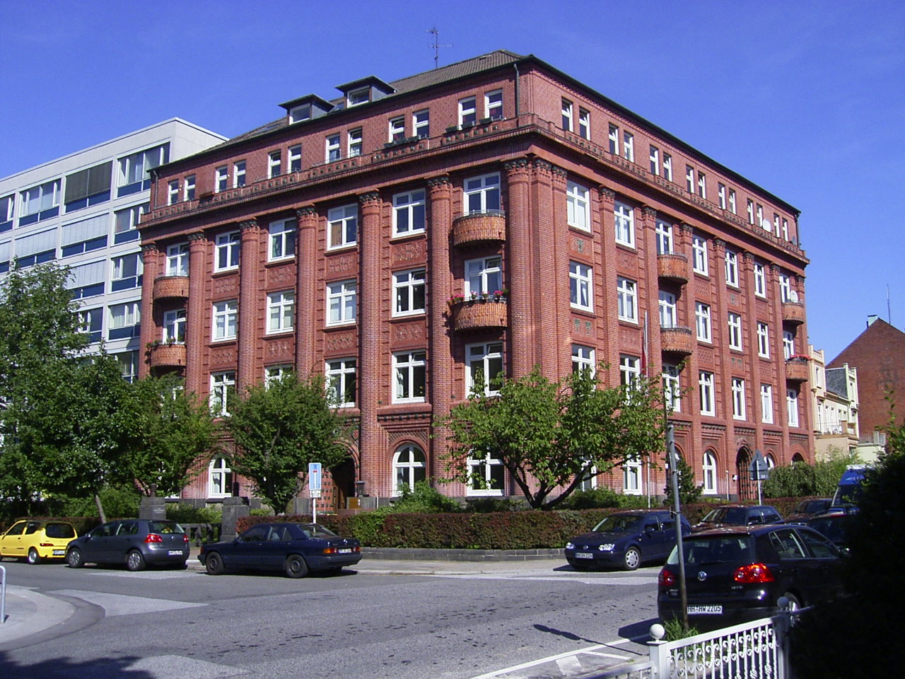 Haus der IG BAU in Borgfelde, 1910/11 für den damaligen Bauarbeiterverband gebaut.